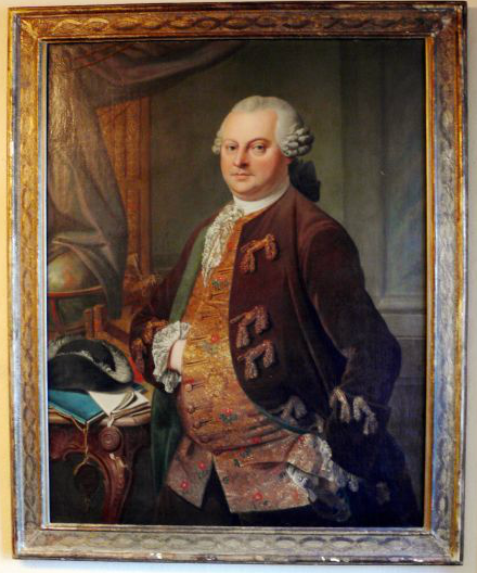 Gemälde des Freiherrn Joachim Josef von Fick (1769) zu Angeltürn, ausgestellt im Heimatmuseum des Heimatvereins Boxberg